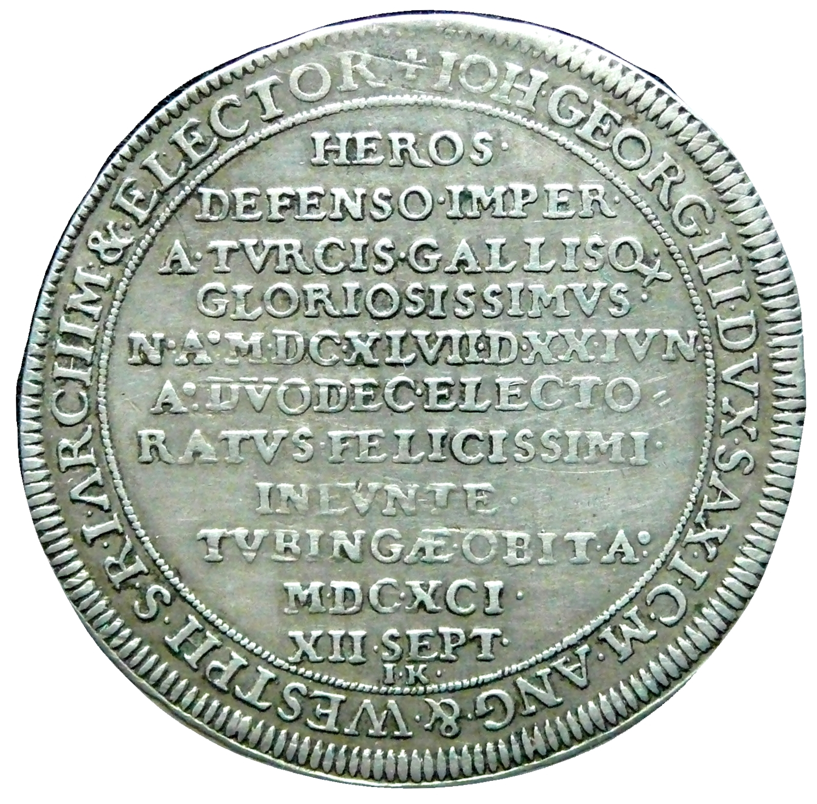 Kuranttaler 1691 Gedenkmünze Auf seinen Tod Johann Georg III. Herzog von Sachsen und Kurfürst Münzstätte Dresden, Münzmeister Johann Koch im Amt 1688 bis 1698 Prägung im 12-Taler-Münzfuß – Leipziger Münzfuß Ag 12 Loth = 750‰ Au Feingewicht: 19,488 g Gewicht: 25,84 g Durchmesser: 43,79-45,80 mm Dicke: 1,95 mm Herrschertitel nach Kreuz als Umschrift oben von rechts beginnend zwischen Rändelrand und inneren Perlenschnurkreis: JOHANNES GEORGIUS III., DUX SAXONIÆ, JULIACI, CLIVIÆ, MONTIUM, ANGARIÆ & WESTFALIÆ, SACRI ROMANI IMPERII ARCHMARSCHALLUS & ELECTOR = Johann Georg III., Herzog von Sachsen, Jülich, Cleve und Berg, Engern und Westfalen, des Heiligen Römischen Reiches Erzmarschall und Kurfürst Inschrift in 11 Zeilen in lateinischer Kapitalschrift innerhalb einer Perlenschnur:HEROS DEFENSO IMPERIO A TURCIS GALLISQUE GLORIOSISSIMUS, NATUS ANNO MDCXLVII DIE XX JUNII, ANNO DUODECIMO ELECTORATUS FELISISSIMI INEUNTE TUBINGÆ OBIT ANNO MDCXCI XII SEPTEMBRIS = ein durch die Verteidigung des Reiches vor Türken und Franzosen hochberühmter Held, geboren am 20. Juni 1647, starb im Beginn des 12. Jahres seiner aufs glücklichste geführten Kurwürde zu Tübingen am 12. September 1691 unten Münzmeisterbuchstaben I ◦ K ◦